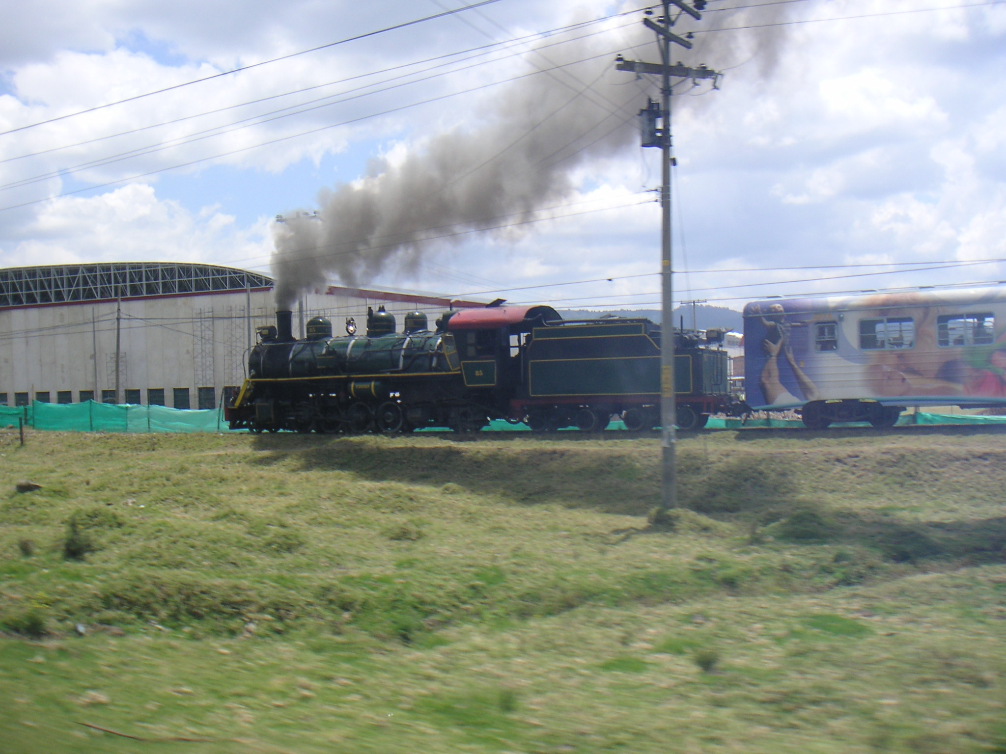 Description: Tren de la Sabana entre Bogotá y Zipaquirá, Cundinamarca, Colombia Source: Louise Wolff (darina), March 2005